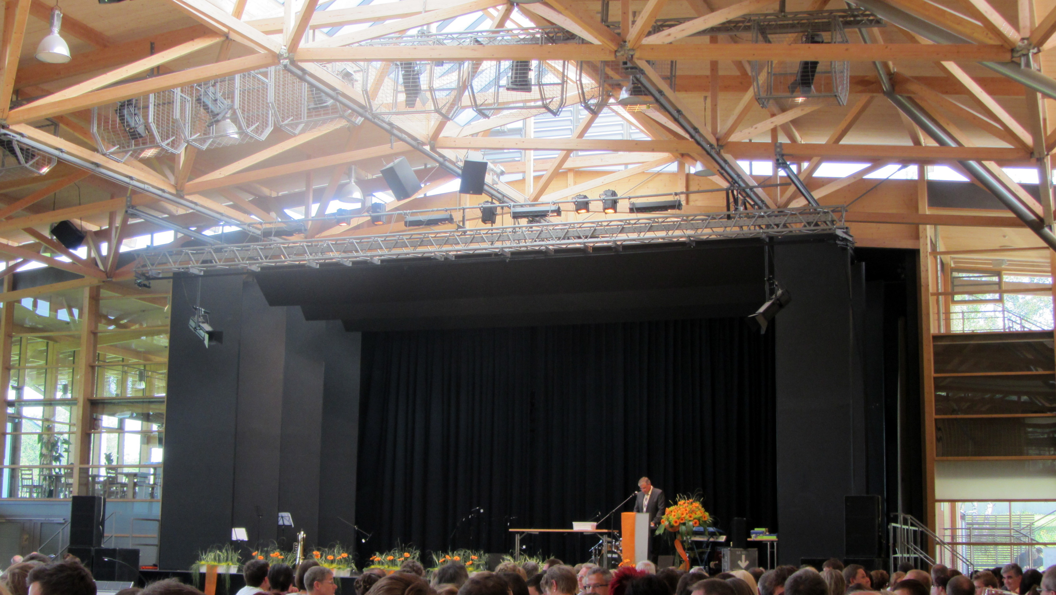 Bürgermeister Andreas Denzel beim Abiball des Gymansiums Ochsenhausen 2012